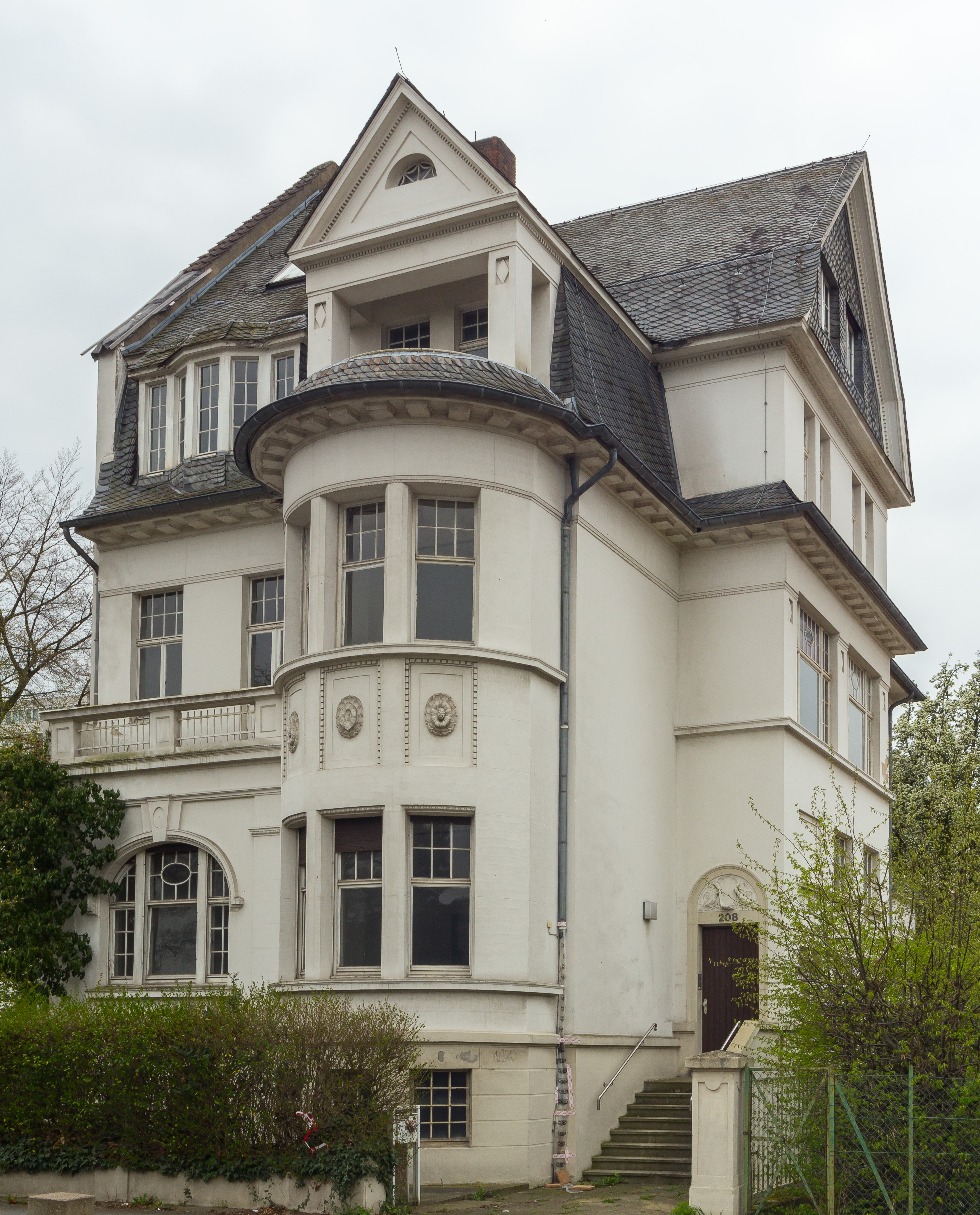 Villa, Adenauerallee 208, Bonn-Gronau. Architekt: Hermann Schmitt